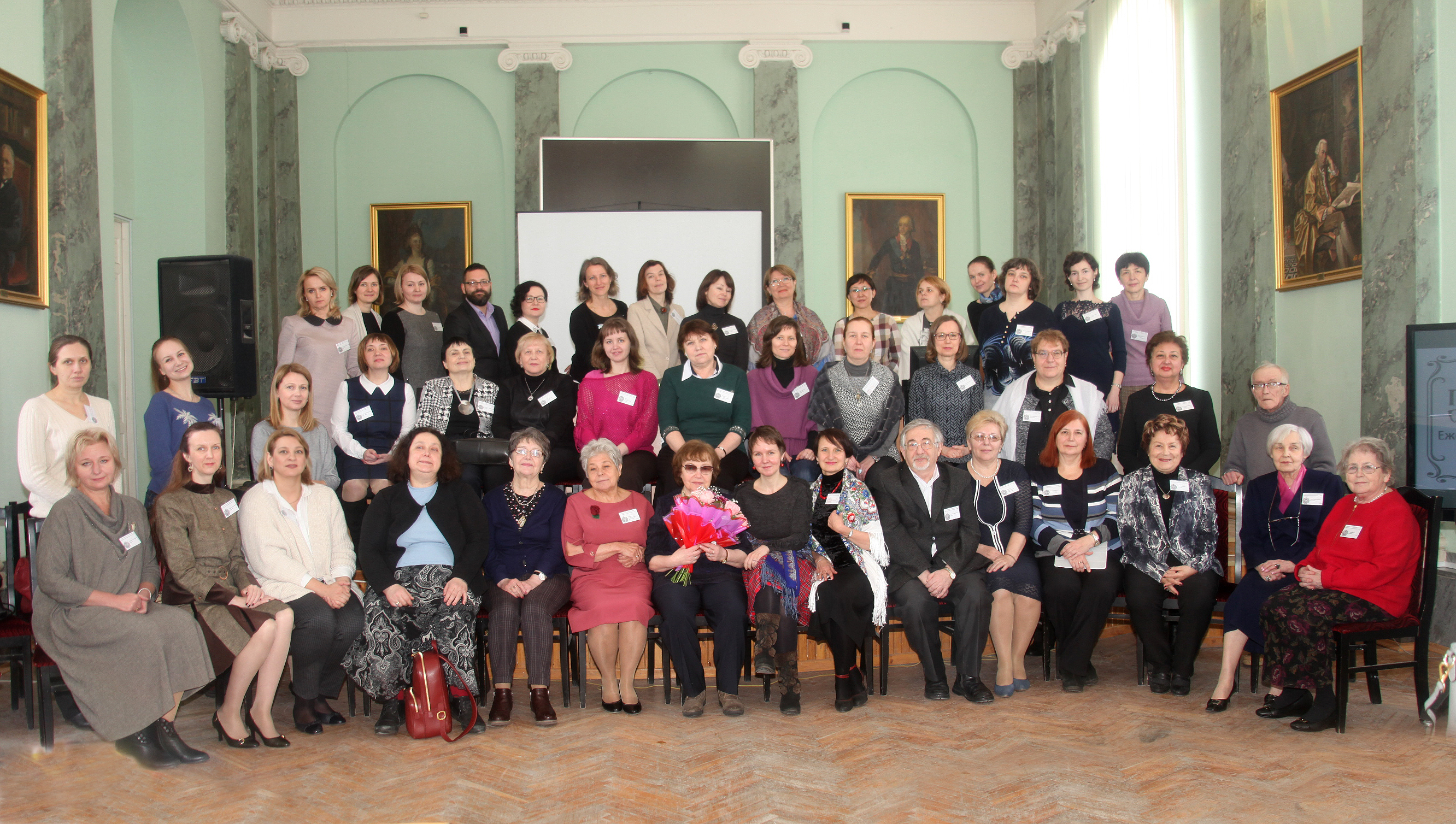 Международная научная конференция "Проблемы онтолингвистики - 2018"